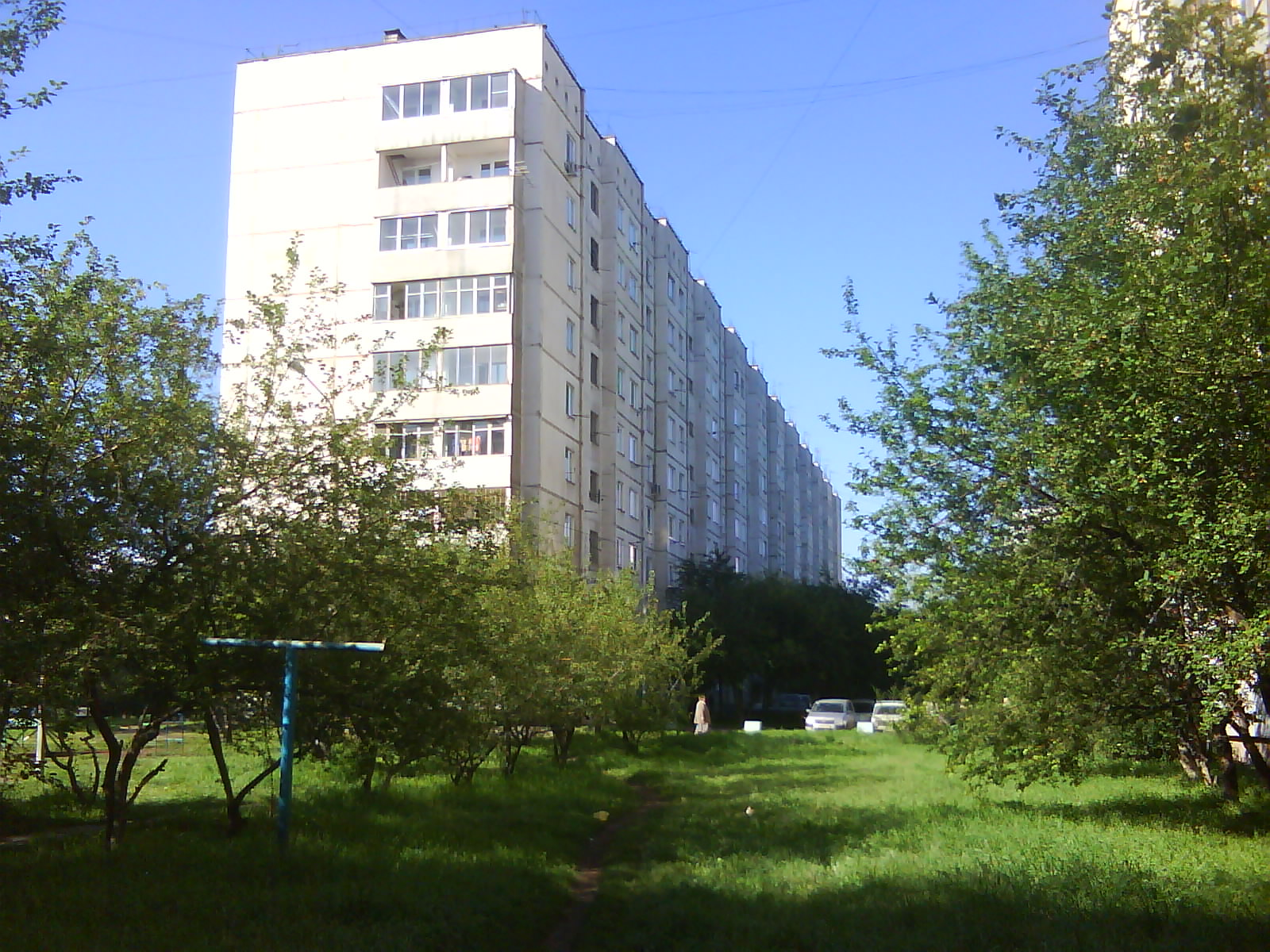 Жилой дом. Красноярск, ул. Энергетиков, 24.JPG